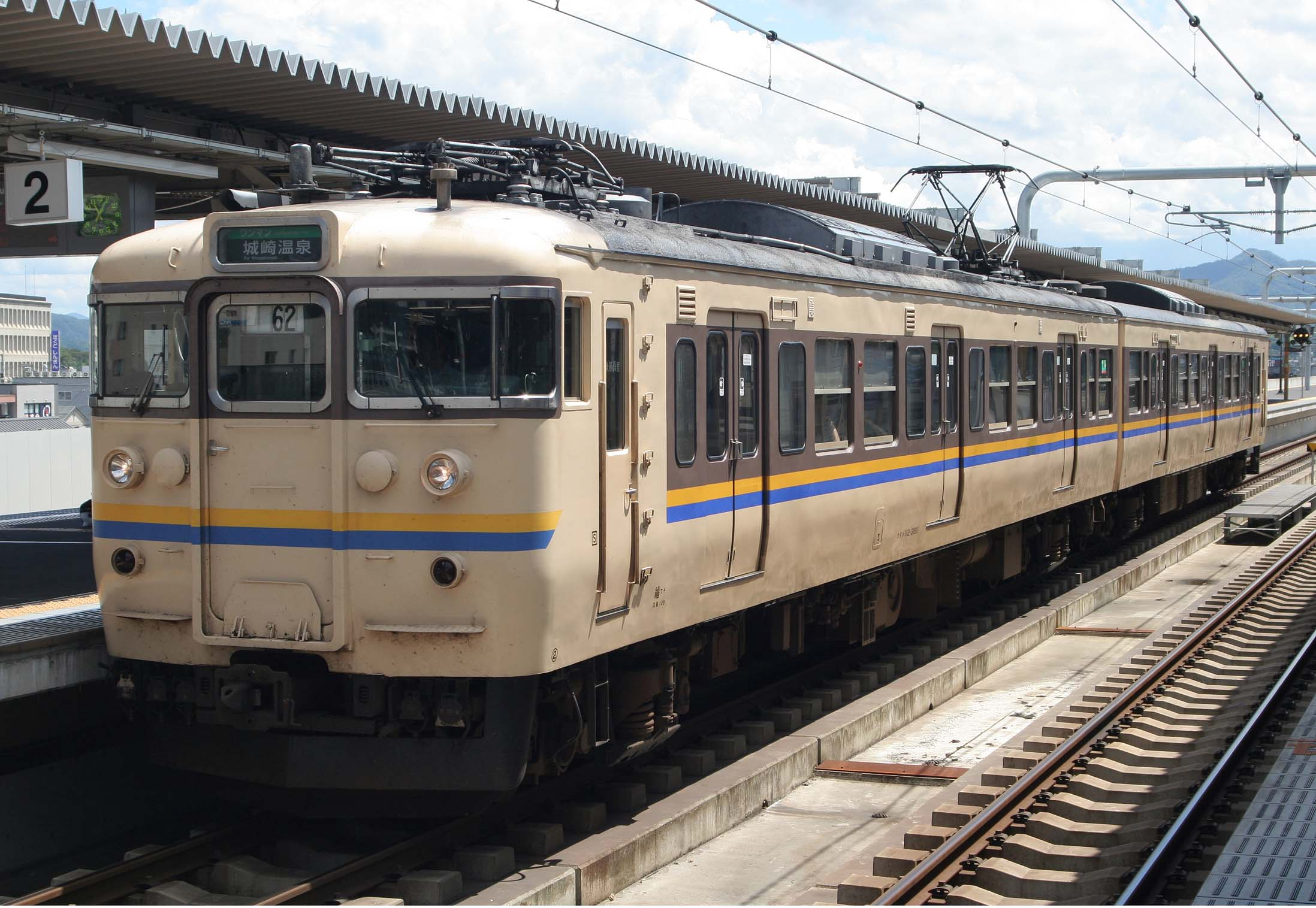 JR西日本113系電車 クモハ112-3811 原形前面 福知山駅にて撮影